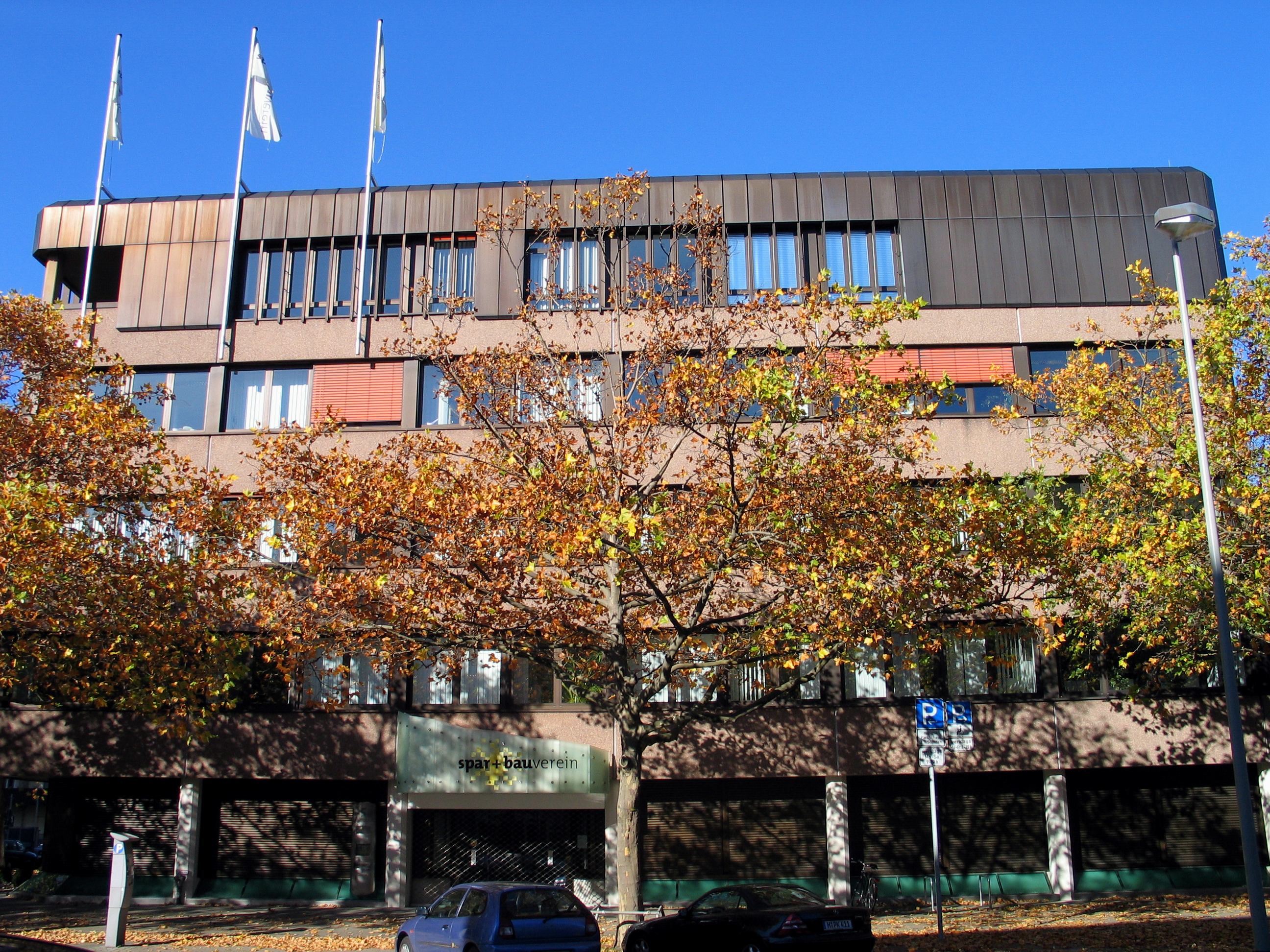 Blick an einem sonnigen Spätherbst-Tag auf das Haupthaus der Spar- und Bauverein e.G. an der Arndtstraße 5 in Hannover ...